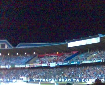 Torcida do grêmio no jogo contra o Cúcuta pela Libertadores 2007.